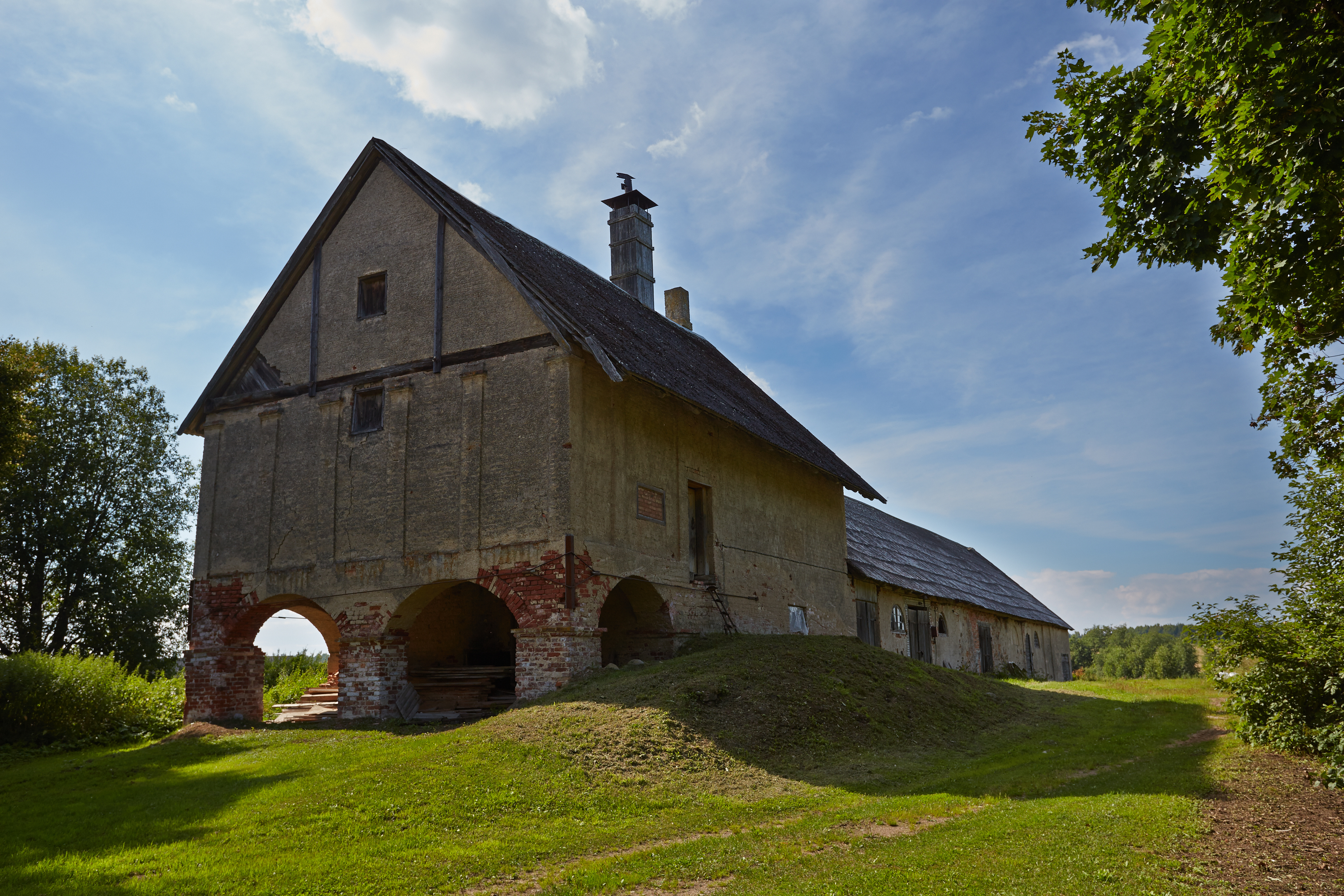 Vana-Roosa mõisa ait-kuivati 2013. aasta augustis.